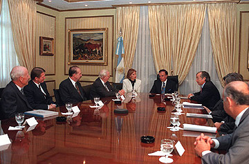 El presidente de la Nación Carlos Menem dialogó con el titular del Grupo Económico Investor, Peter Wallemberg, quien asistió acompañado del secretario de Industria, Comercio y Minería, Alieto Guadagni.